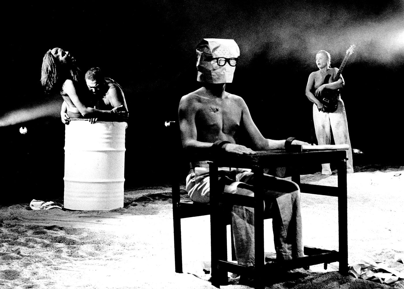 Der Ignorant und der Wahnsinnige von Thomas Bernhard. Regie: Urs Odermatt. Oldenburgisches Staatstheater.